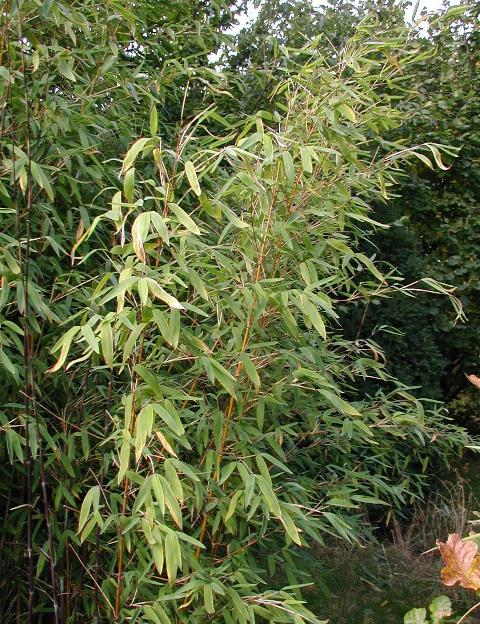 Fargesia murieliae